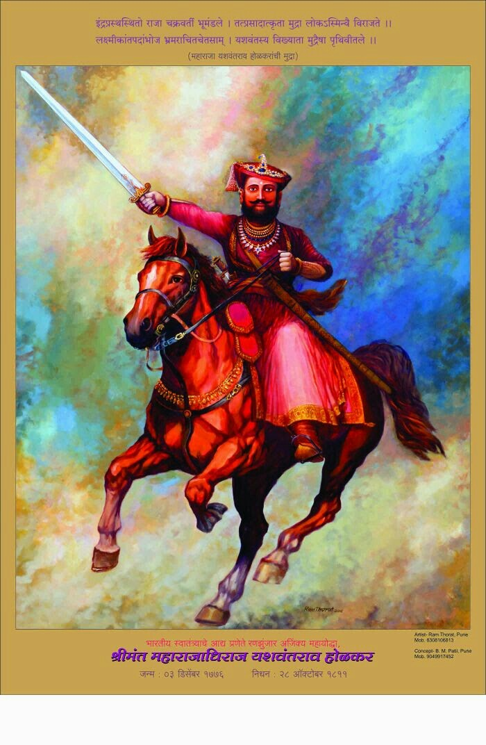 श्रीमंत चक्रवर्ती महाराजा यशवंतराव होळकर